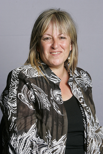 24.07.2010, Lloret de Mar Llistes Parlament Catalunya 2010.